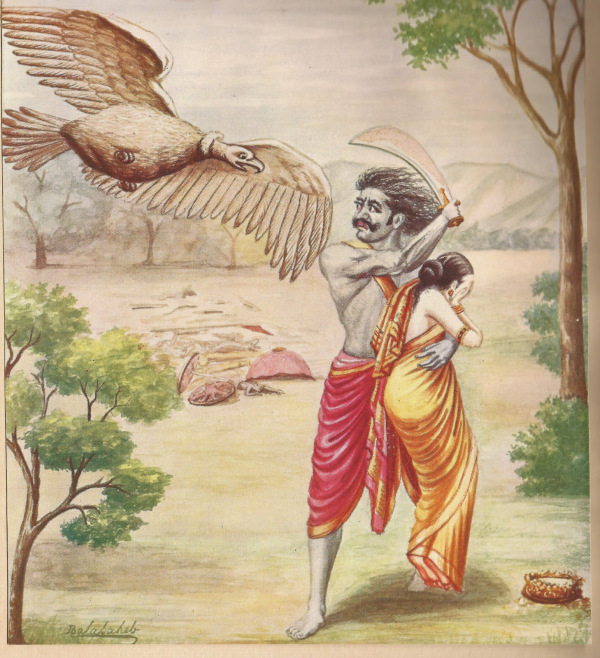 Killing of Jatayu Bird Painting by Balasaheb Pant Pratinidhi